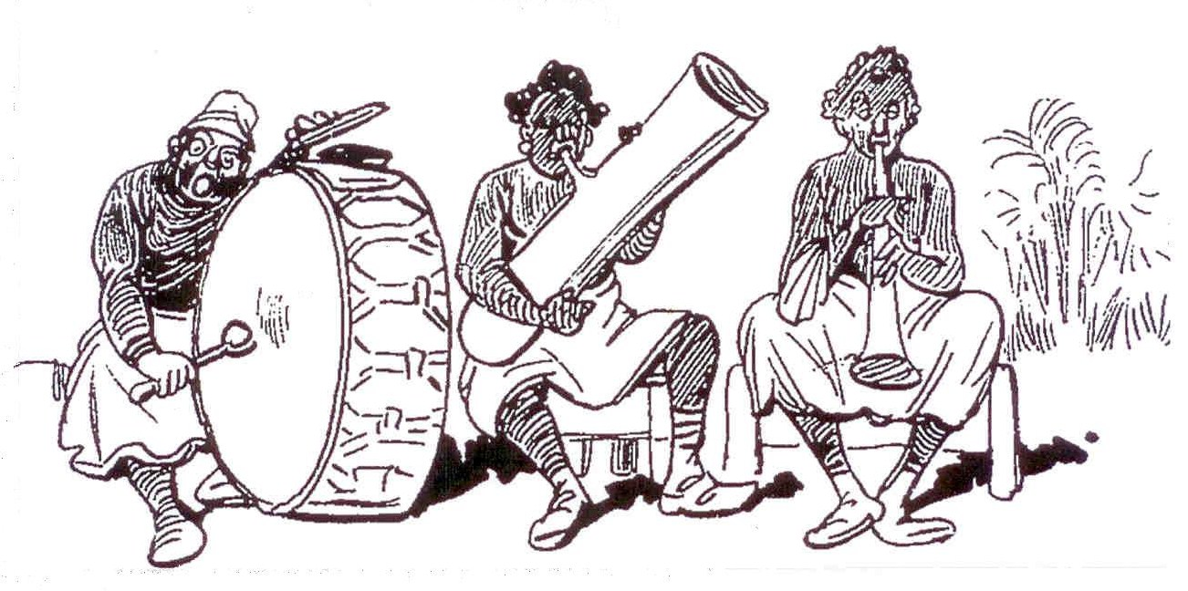 Ensemble bigophonique : grosse caisse avec cymbales, et 2 bigophones, Behanzin soufflant dans celui du mileu du dessin.